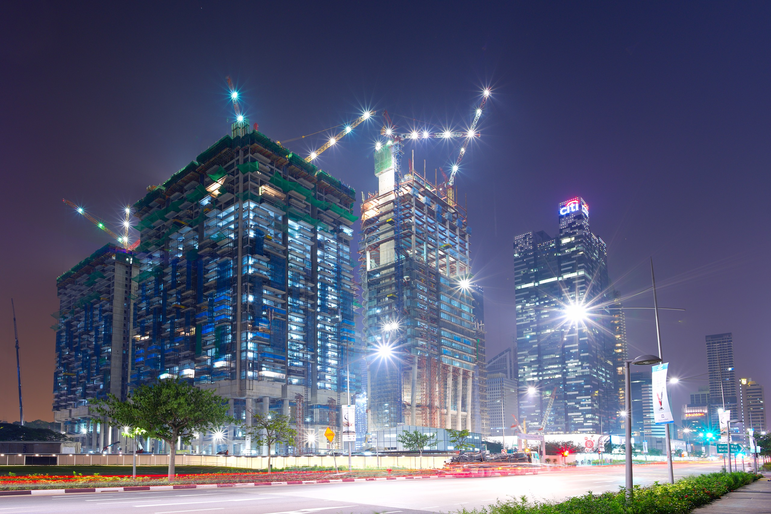 Marina One project